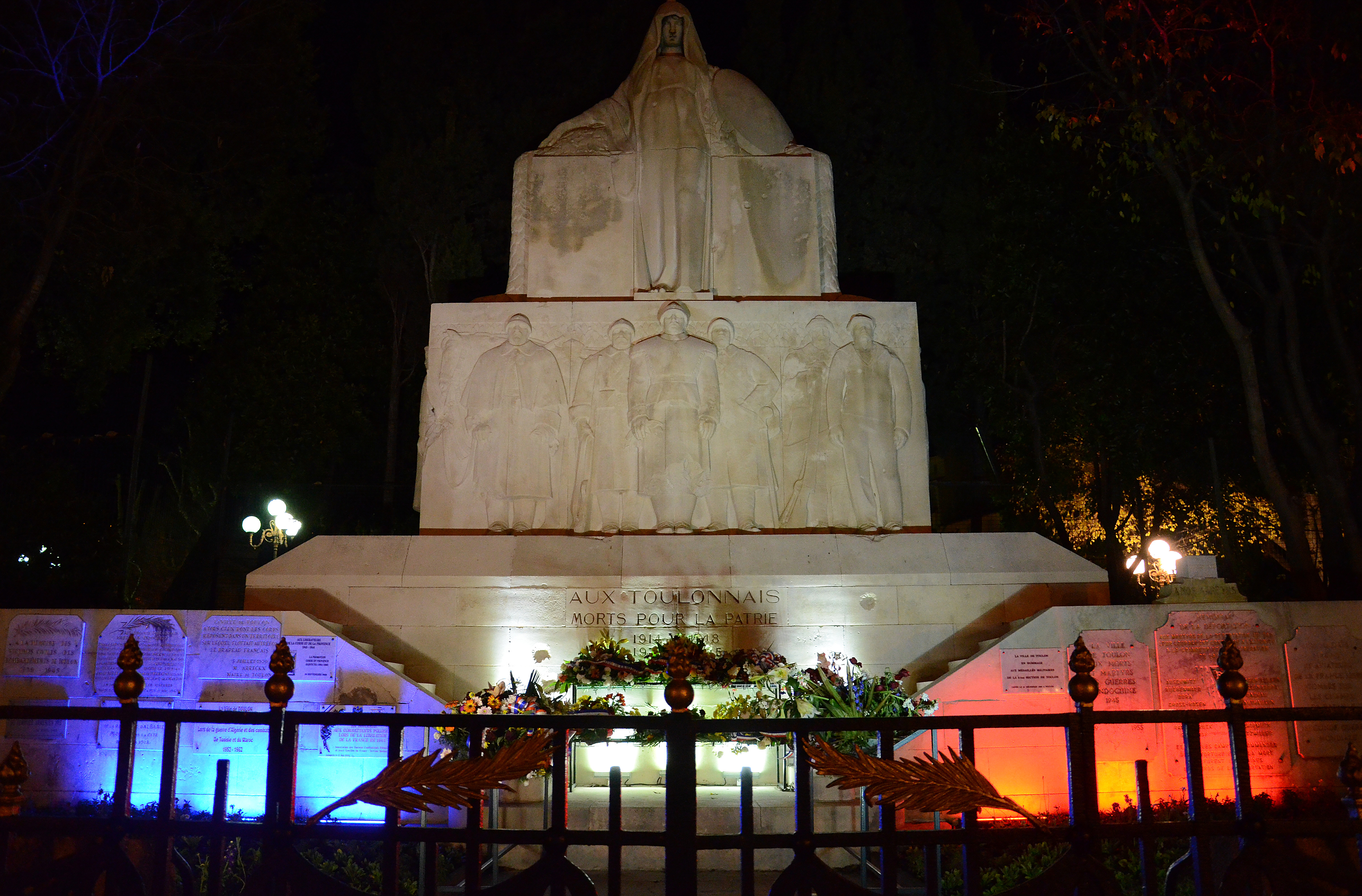 Monument aux morts de la Première Guerre mondiale, Place Gabriel-Péri (Inscrit, 2010) .